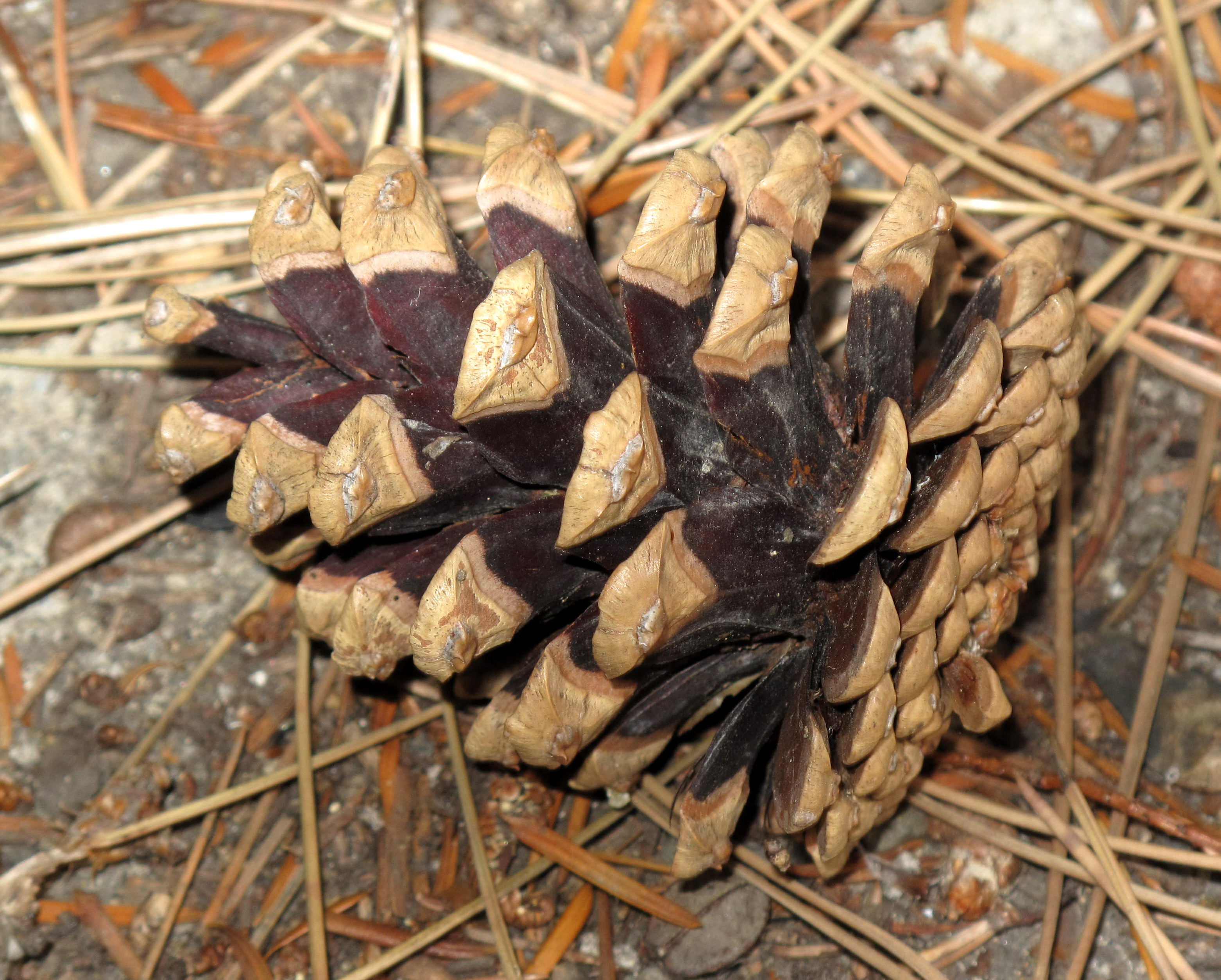 Borovicová šiška Pinus nigra